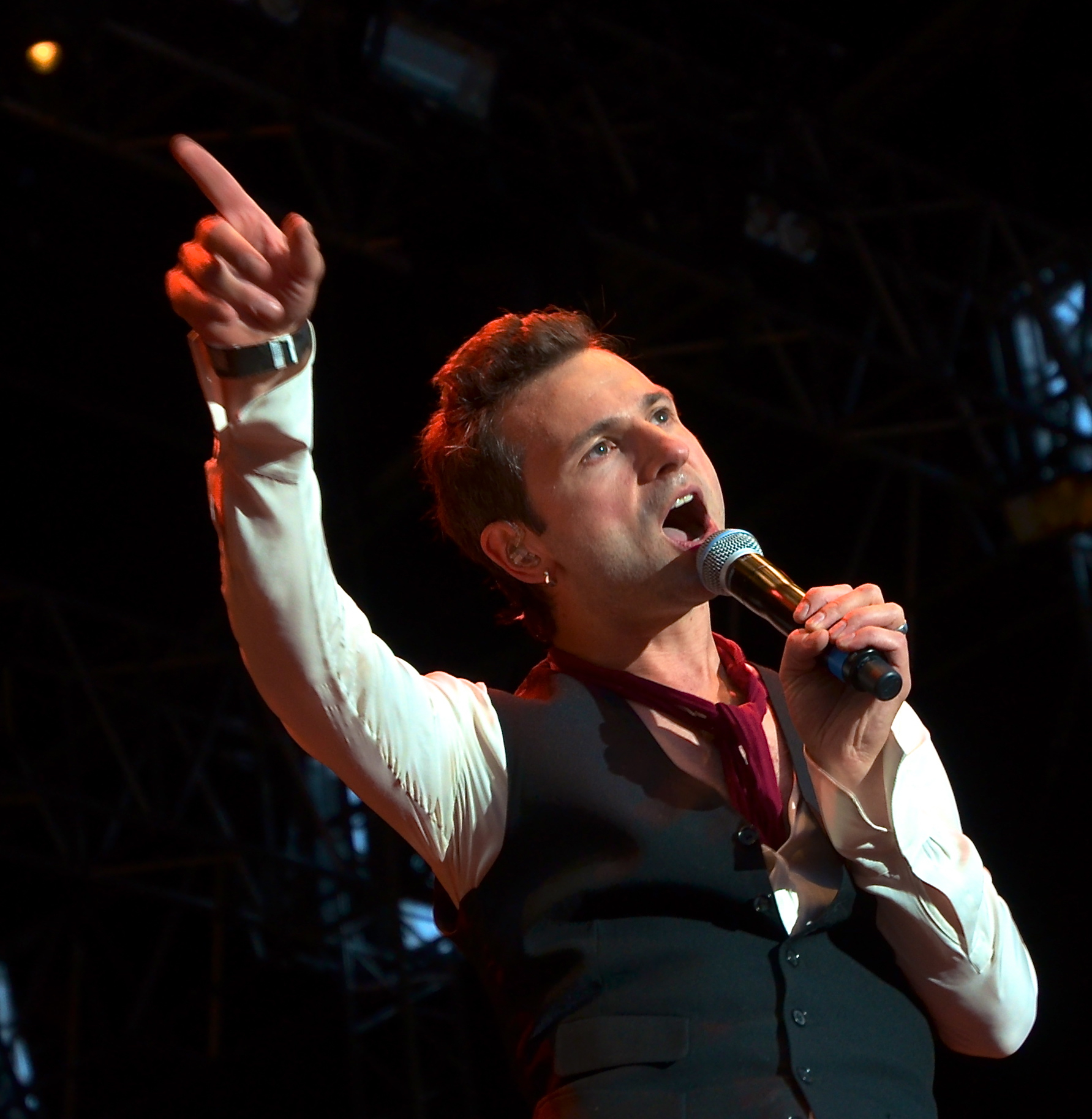 Ola Salo på Stockholms kulturfestival den 16 augusti 2012.